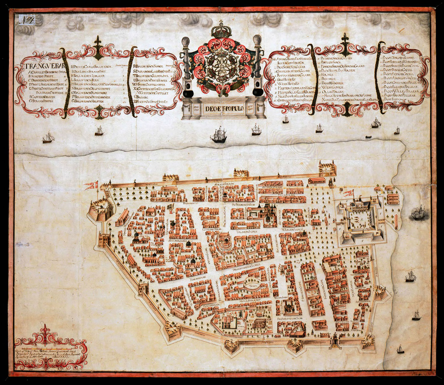 Karte von Tranquebar 1733